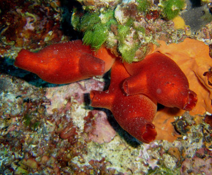 Image pour Boite-Utilisateur Projet Biologie (Urochordata) (Photo personnelle)